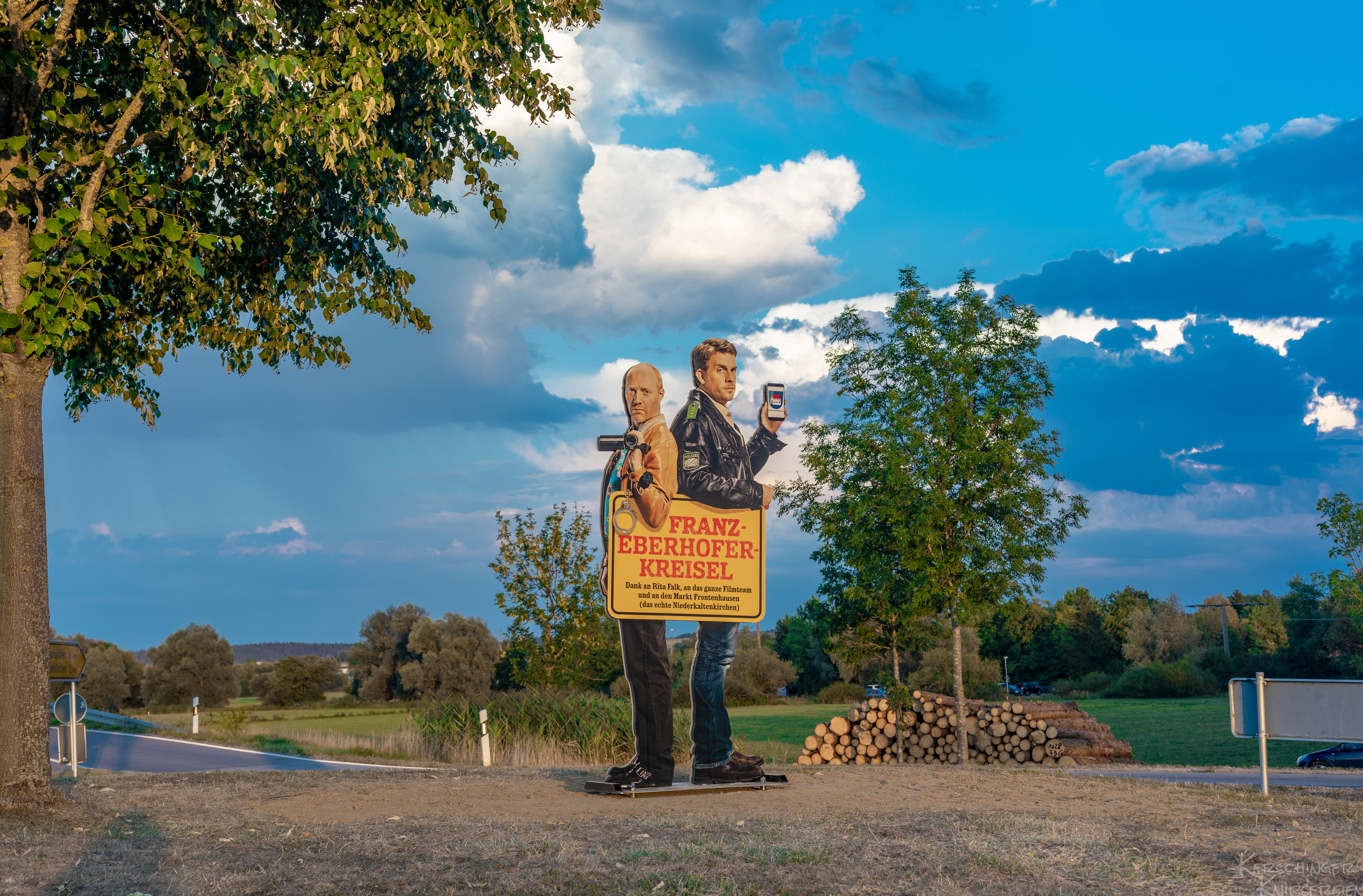 Ehre, wem Ehre gebührt: Endlich hat der Eberhofer Franz "seinen" Kreisverkehr bekommen. Ganz Niederkaltenkirchen freut sich.